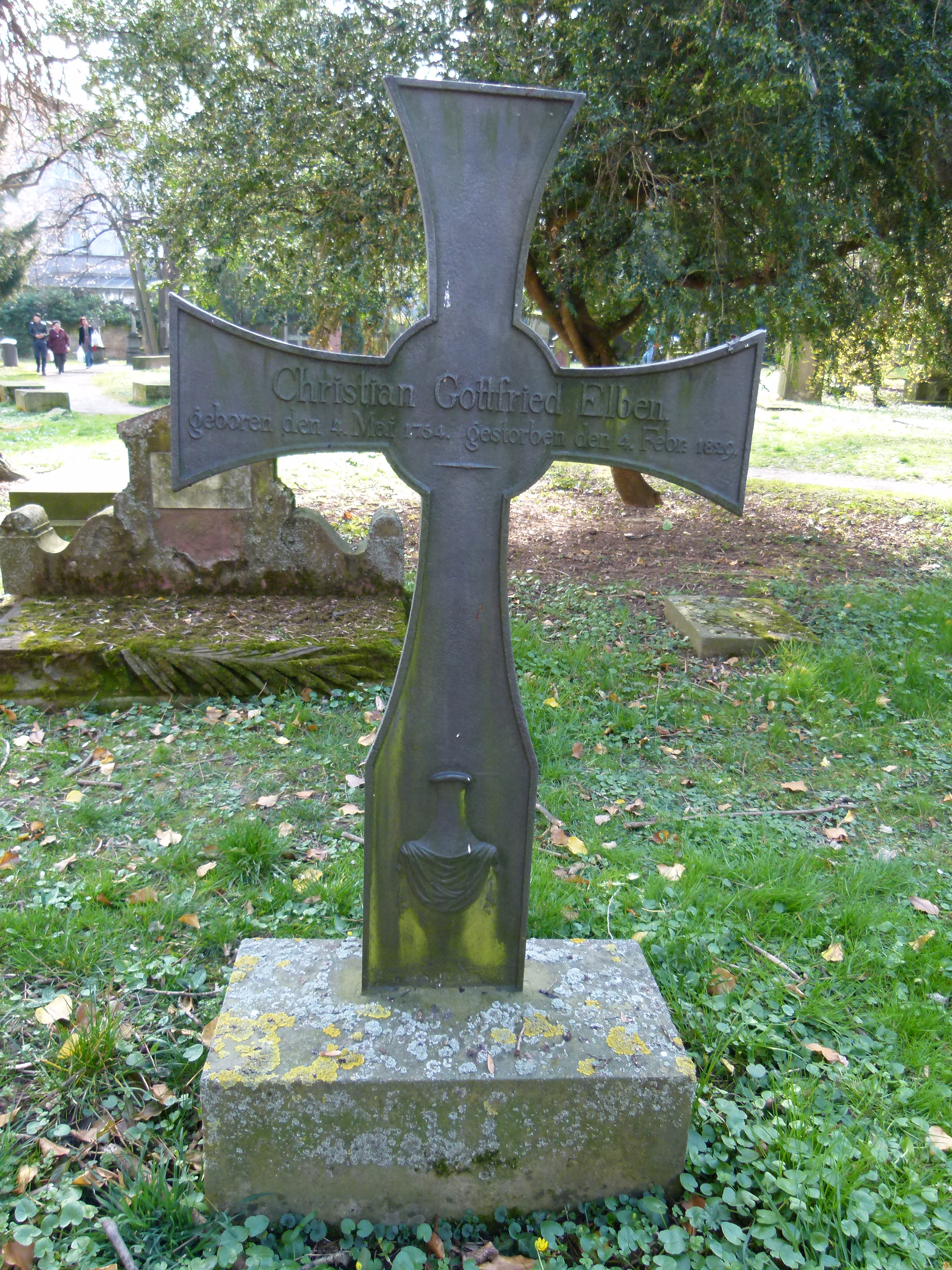 Grab von Christian Gottfried Elben (1754-1829), Hoppenlaufriedhof in Stuttgart